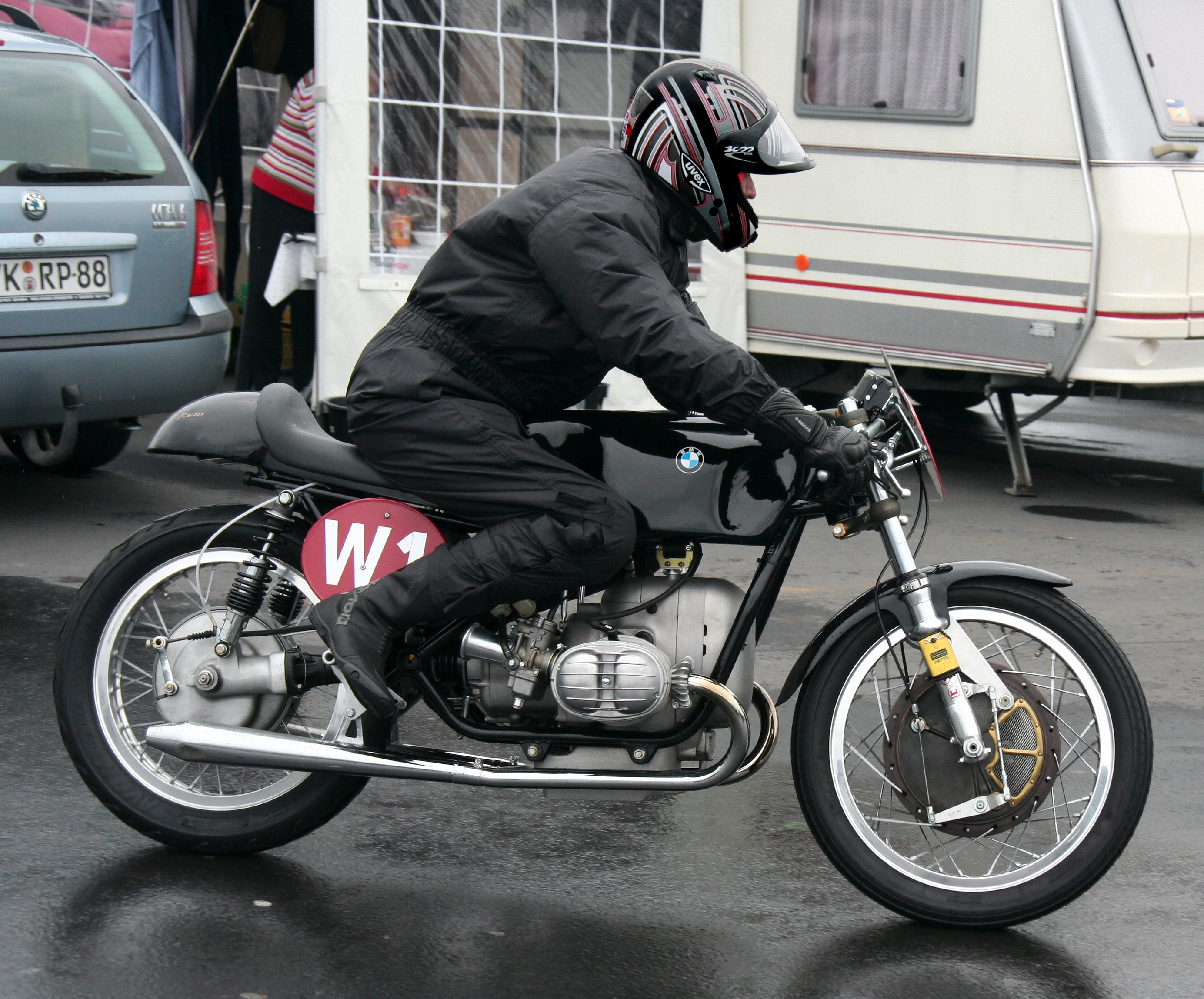 BMW Kaczor, Baujahr 1968, beim Oldtimer Festival Nürburgring 2007. Der Konstrukteur Ferdinand Kaczor wurde 1941 in Altheim bei Landshut als ältestes von acht Kindern geboren. Er wurde Schlosser und begeisterte sich bald für Motorräder. Zunächst fuhr er eine 125er und bald schon eine 500-cm³-BMW. Während seiner Bundeswehrzeit entwarf Kaczor sein erstes Fahrwerk für die Zweizylinder-BMW. 1965 baute er es und fuhr damit Rennen. Ab 1968 arbeitete er in der Versuchsabteilung von BMW. Am 20. Juni 1970 verunglückte er 29-jährig beim Training zum Motorradrennen in Ziersdorf (Österreich) tödlich.